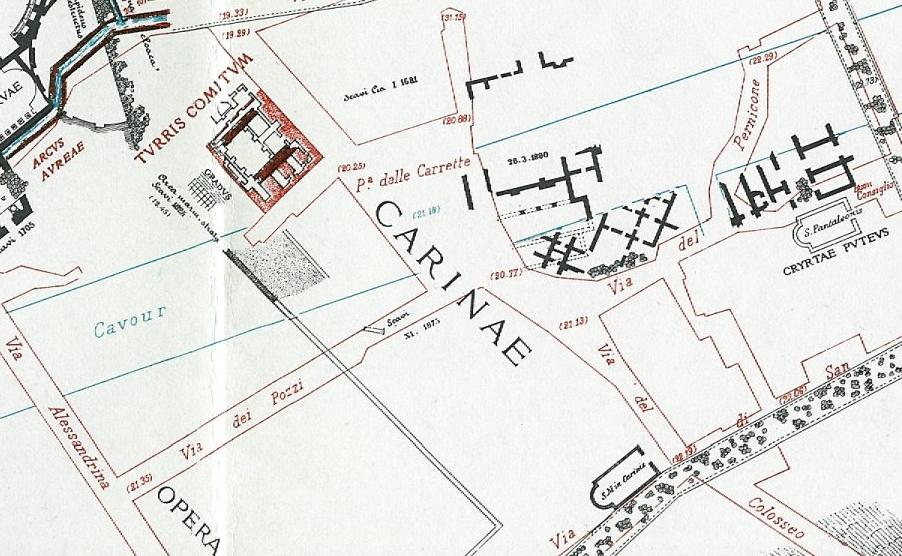 Pianta di Lanciani